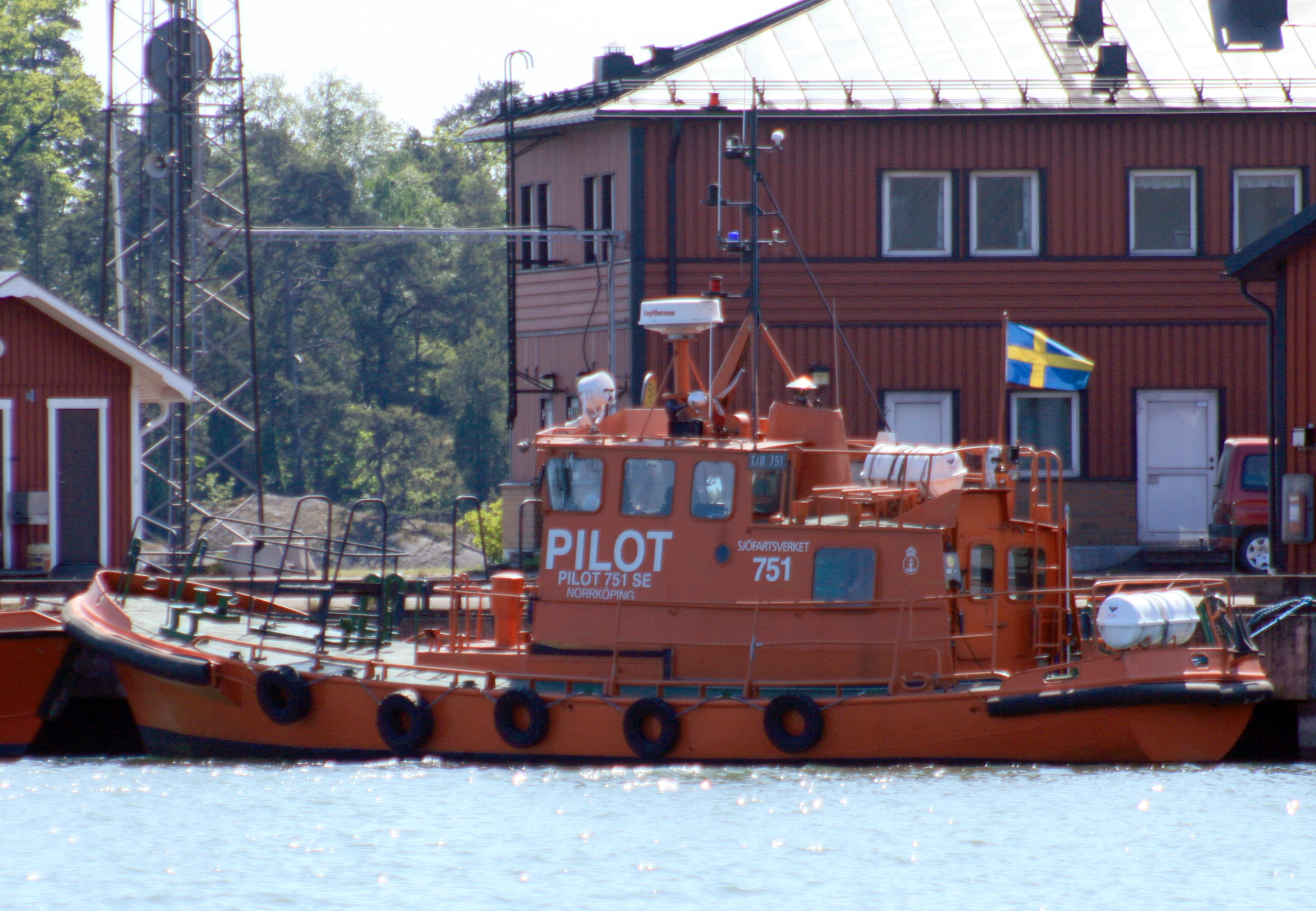 Pilot 751 SE i Oxelösund 7 juni 2008